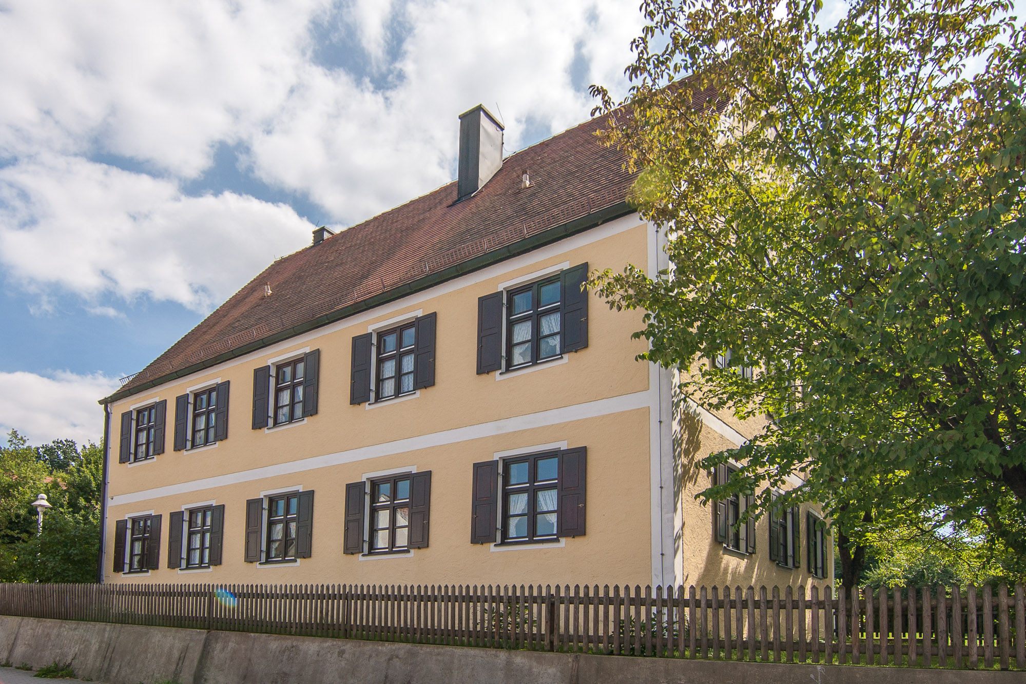 Pfarrhaus; erbaut 1743.This is a photograph of an architectural monument.